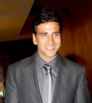 Akshay Kumar at Akshay Kumar and Katrina Kaif at 'De Dana Dan' media meet